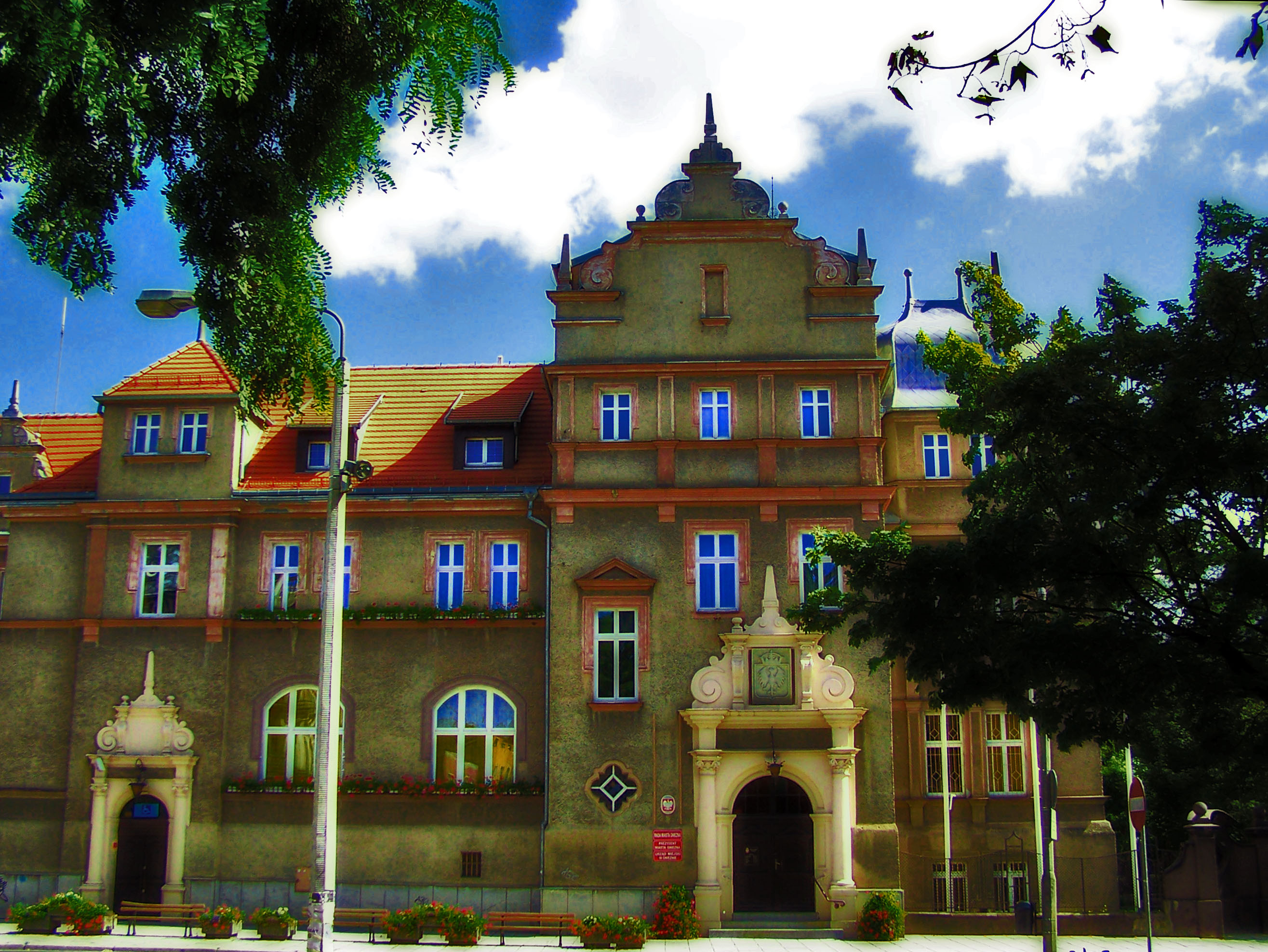 Gniezno ul. Lecha 6 (zespół starostwa z 1899 r.)